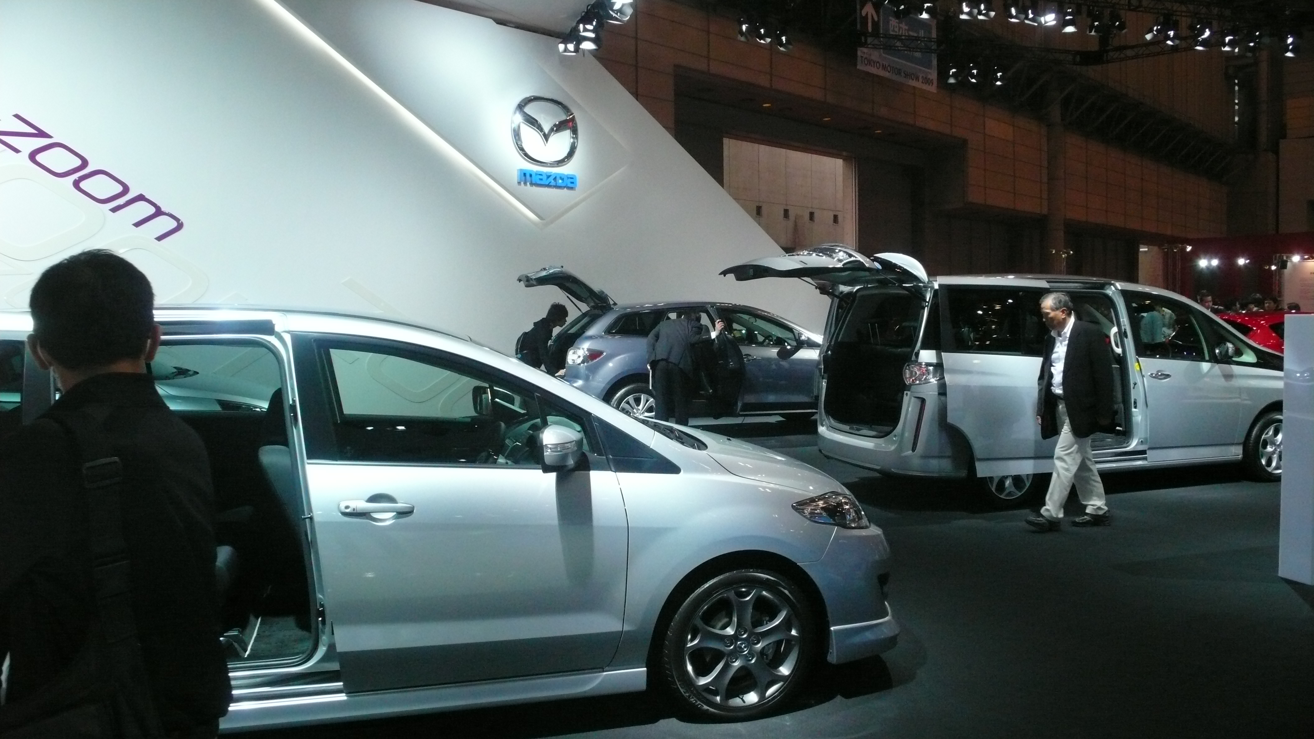 Mazda